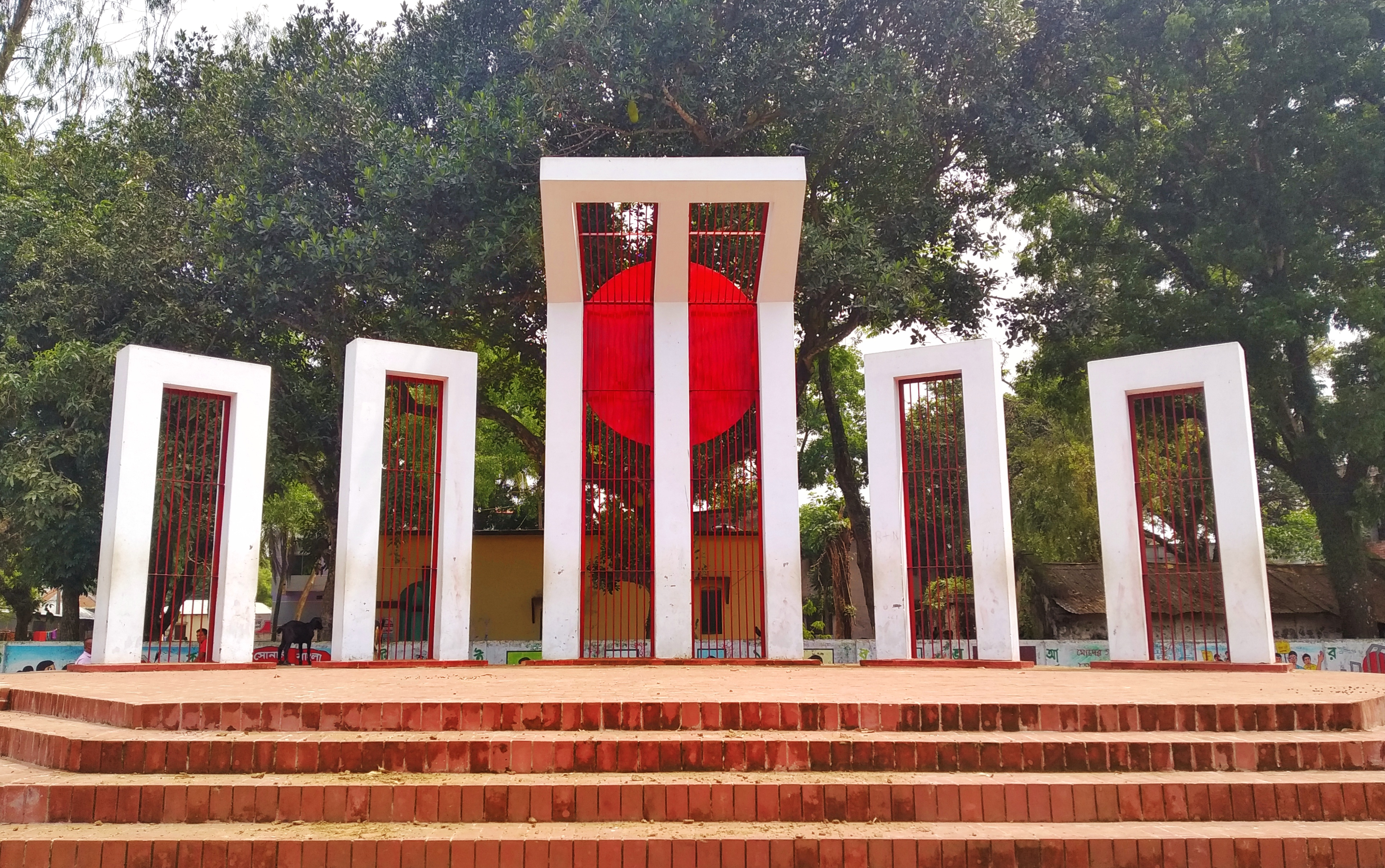 বিরামপুর শহীদ মিনার